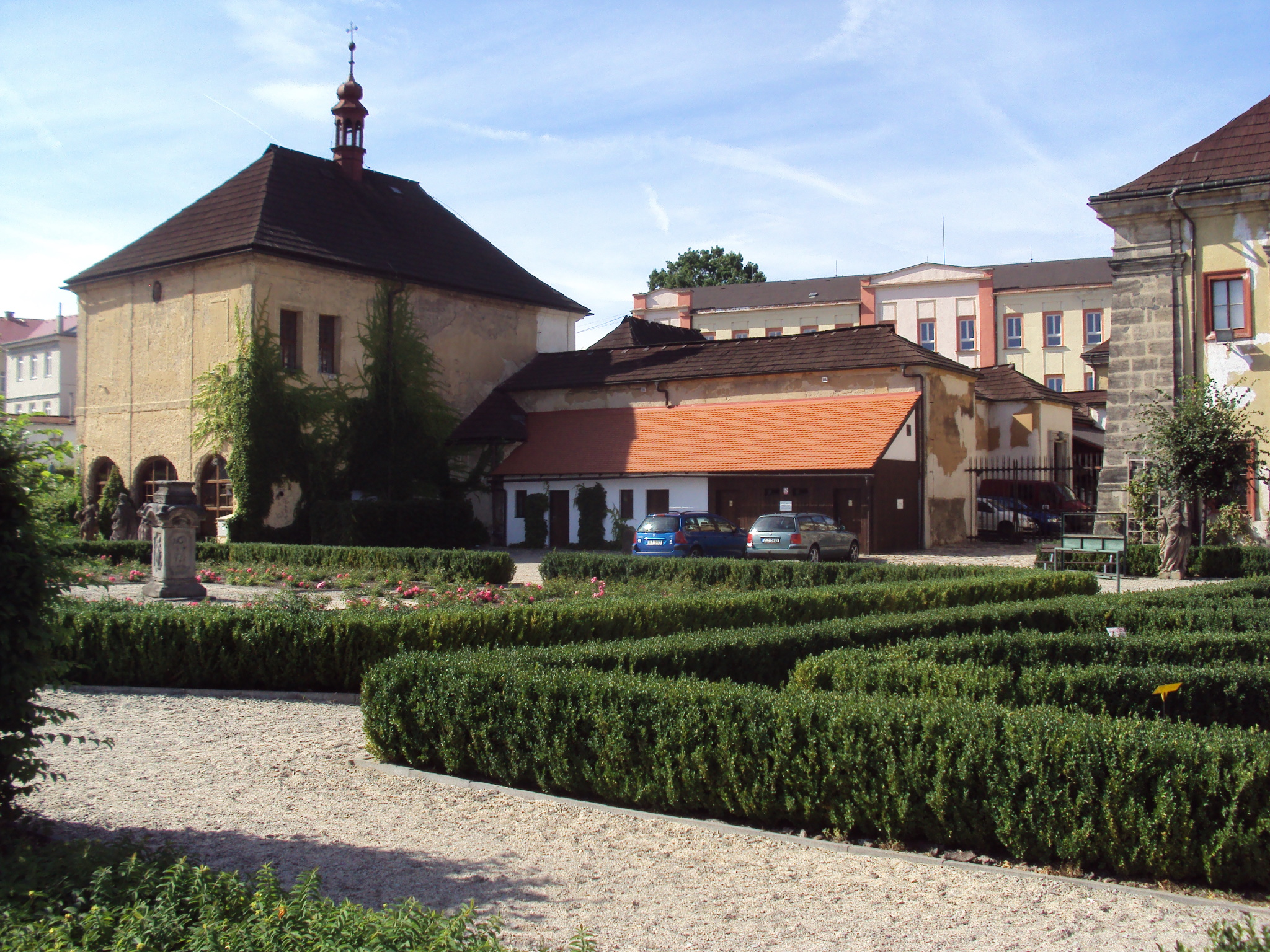 Areál kláštera, tato část patří muzeu, pohled od zahrady